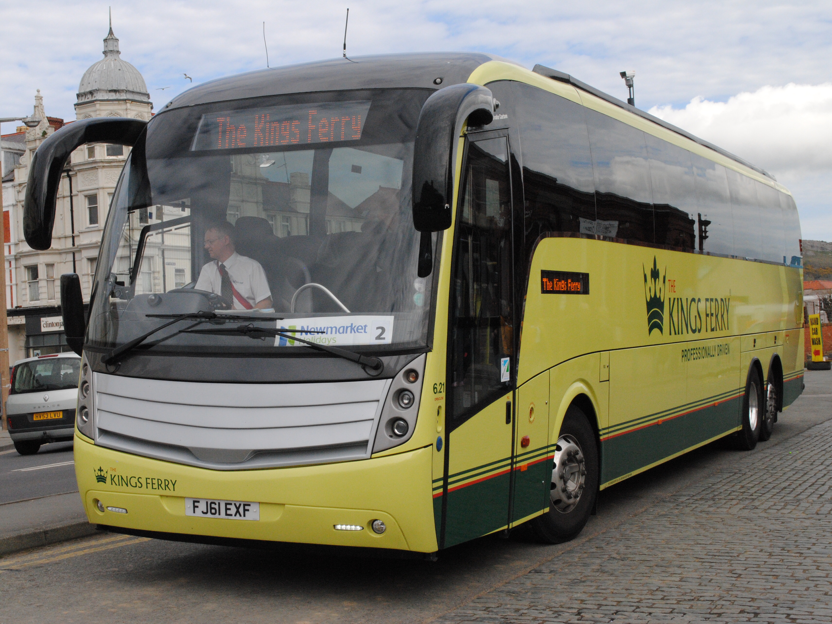 Volvo B13R Caetano Levante